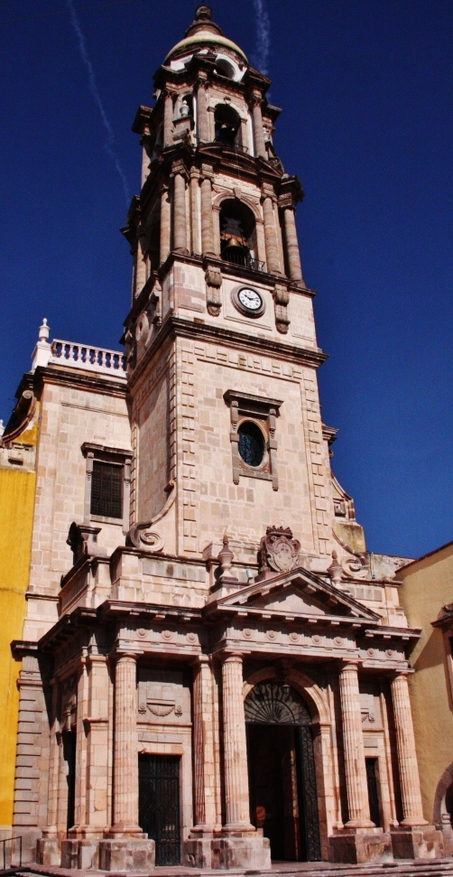 Templo de la Virgen del Carmen, Celaya, Guanajuato, México